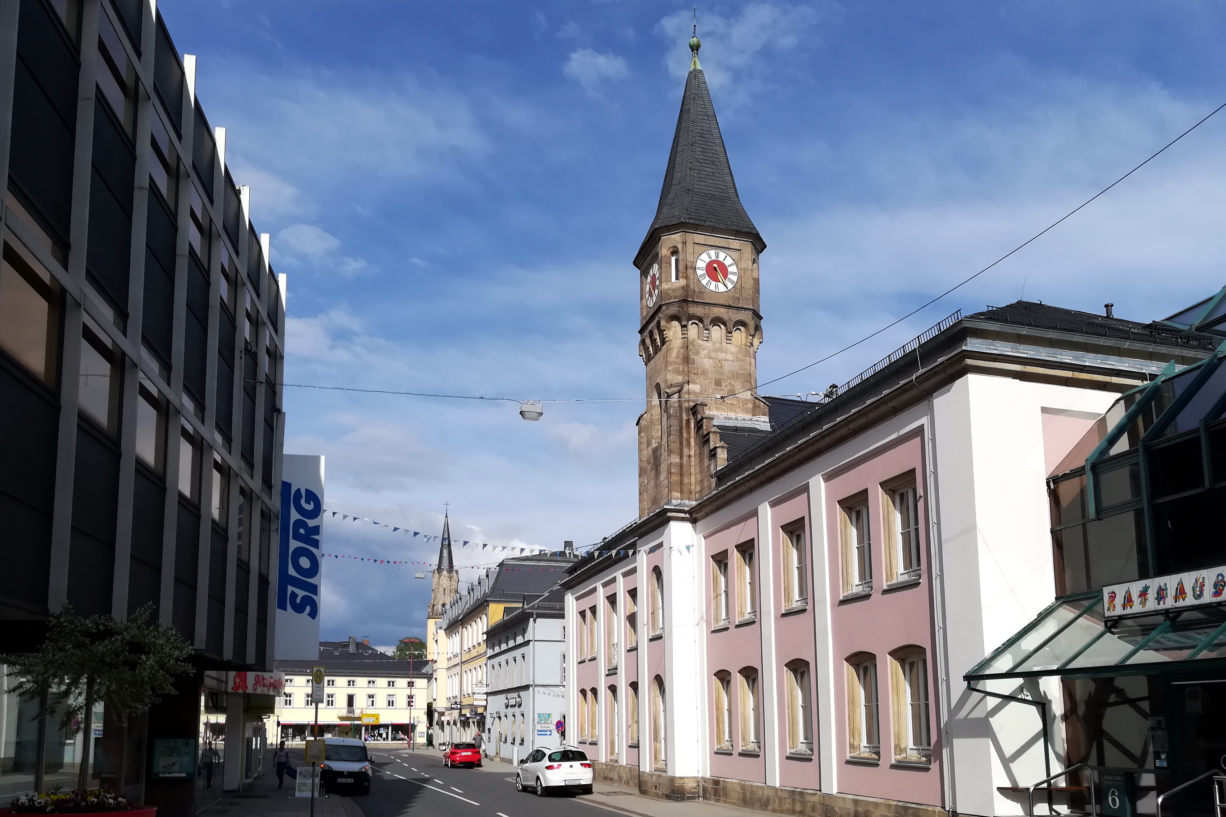 Zweigeschossiger Walmdachbau mit Putzgliederungen, über dem Mittelrisalit gotisierender Turm in Werkstein, 1861–62, später erweitert, mit Ausstattung.